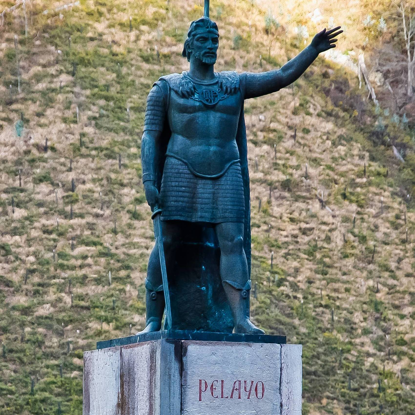 Covadonga, conjunto paisajístico